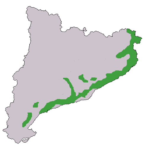 Distribució del pi pinyer (Pinus pinea) a Catalunya.